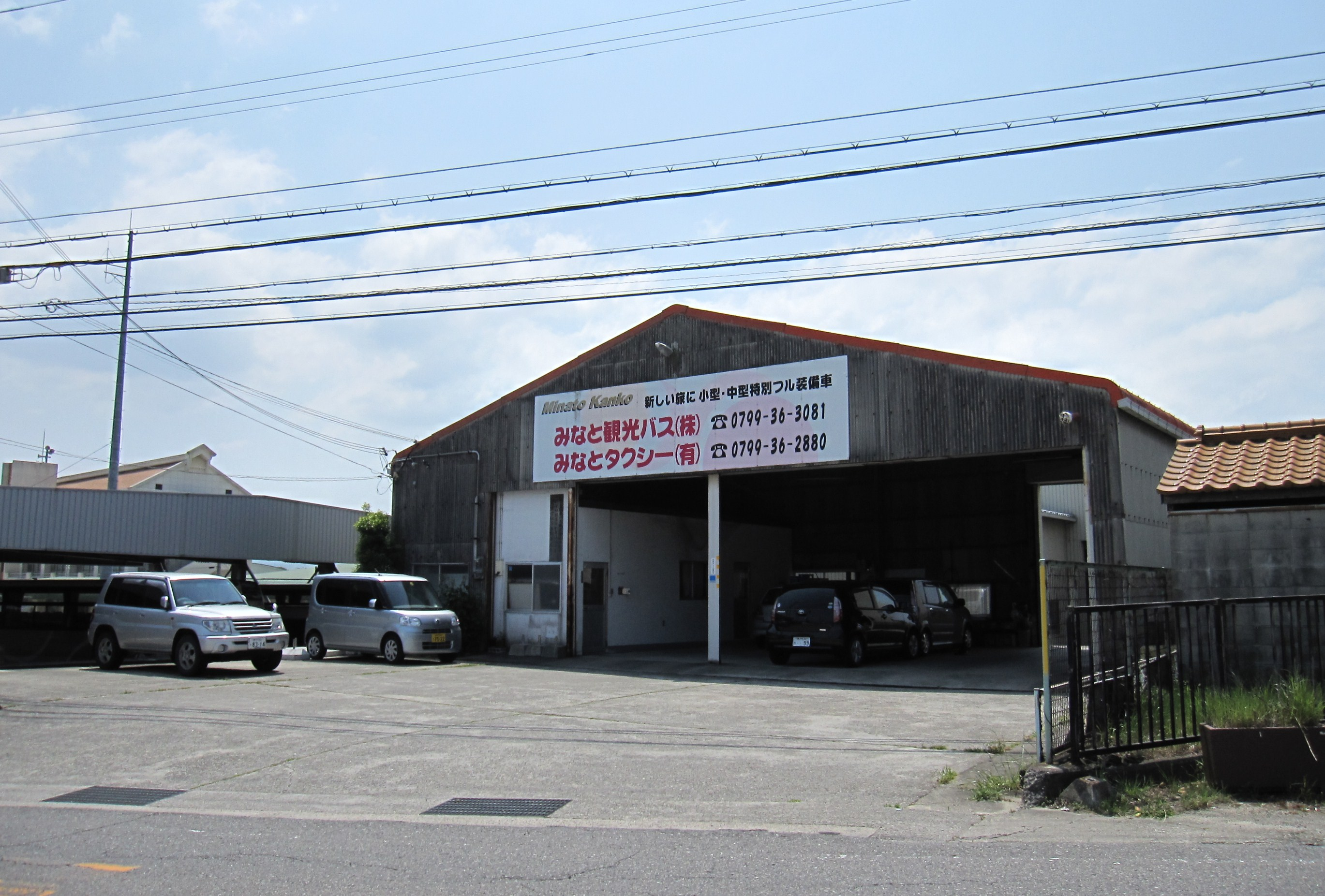 みなと観光バス本社